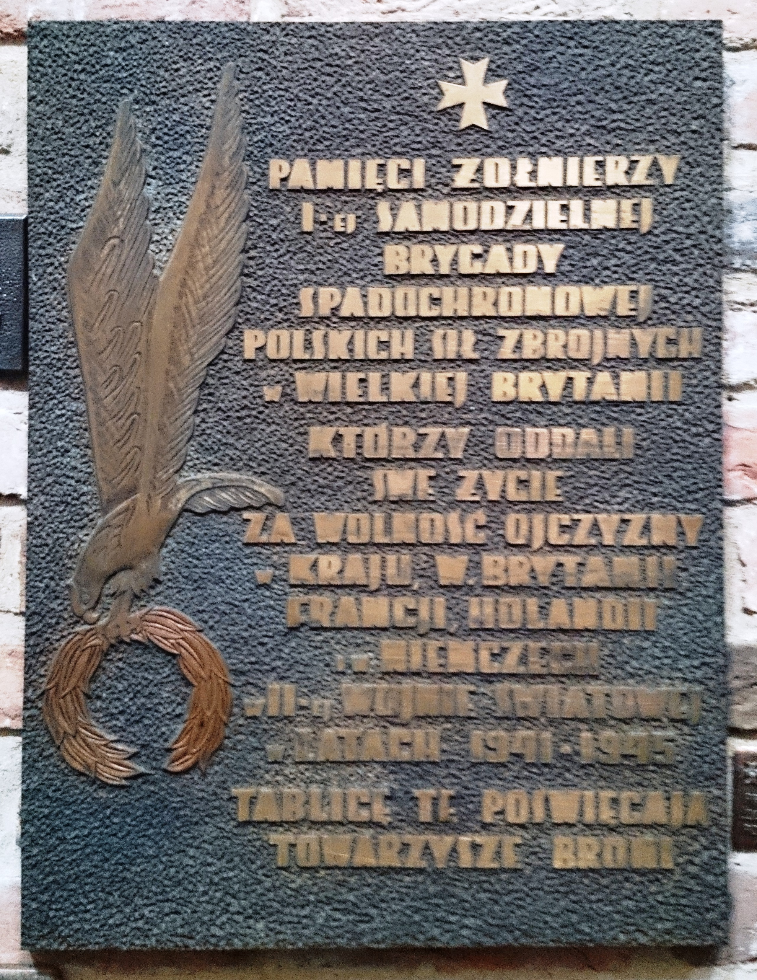 Tablica poświęcona I Samodzielnej Brygadzie Spadochronowej w kościele św. Marcina w Warszawie